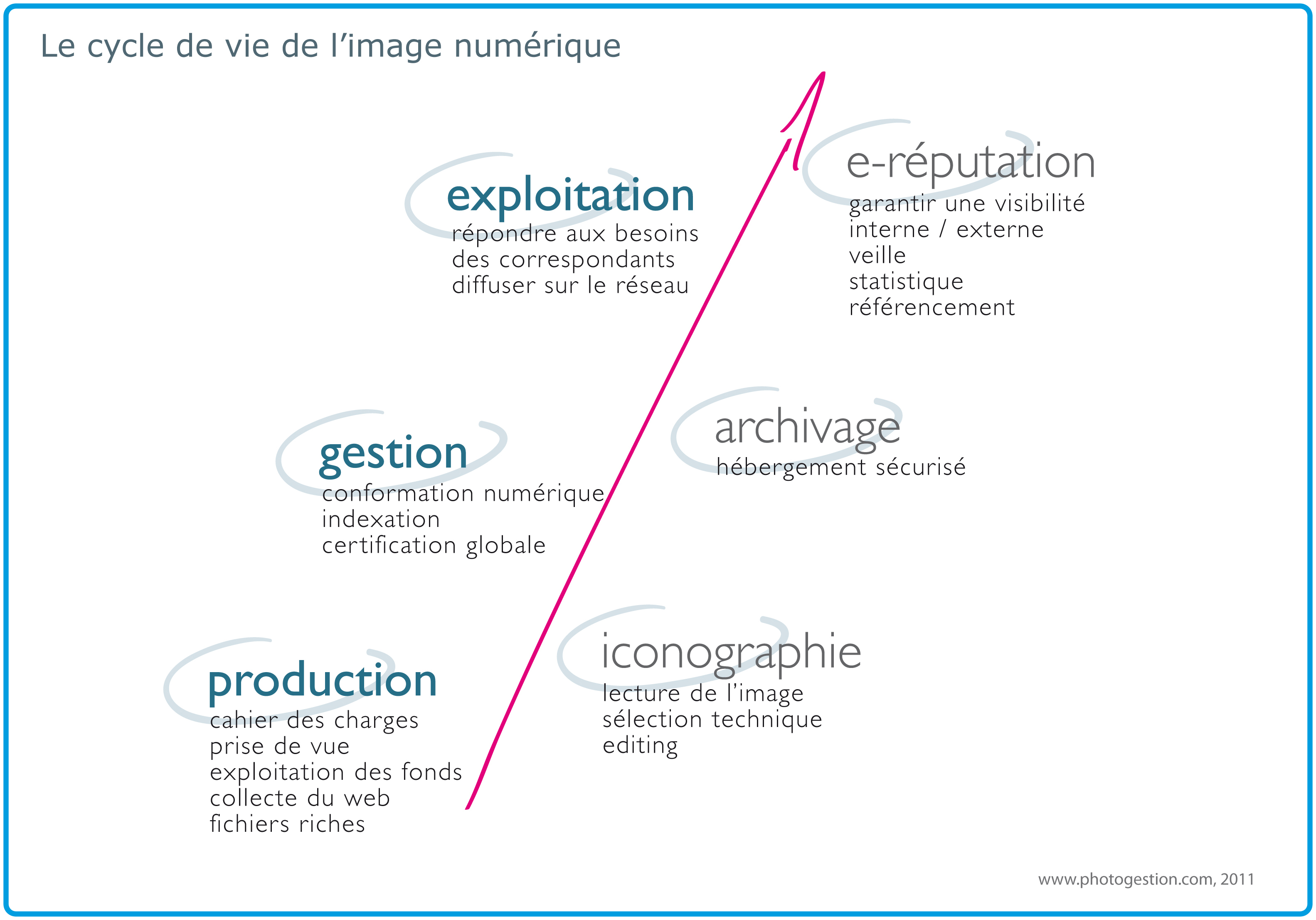 La bonne gestion des objets passe par une vision globale de ces états, de l'élaboration du cahier des charges avant sa production jusqu'au contrôle en aval de sa publication en intégrant la web réputation.